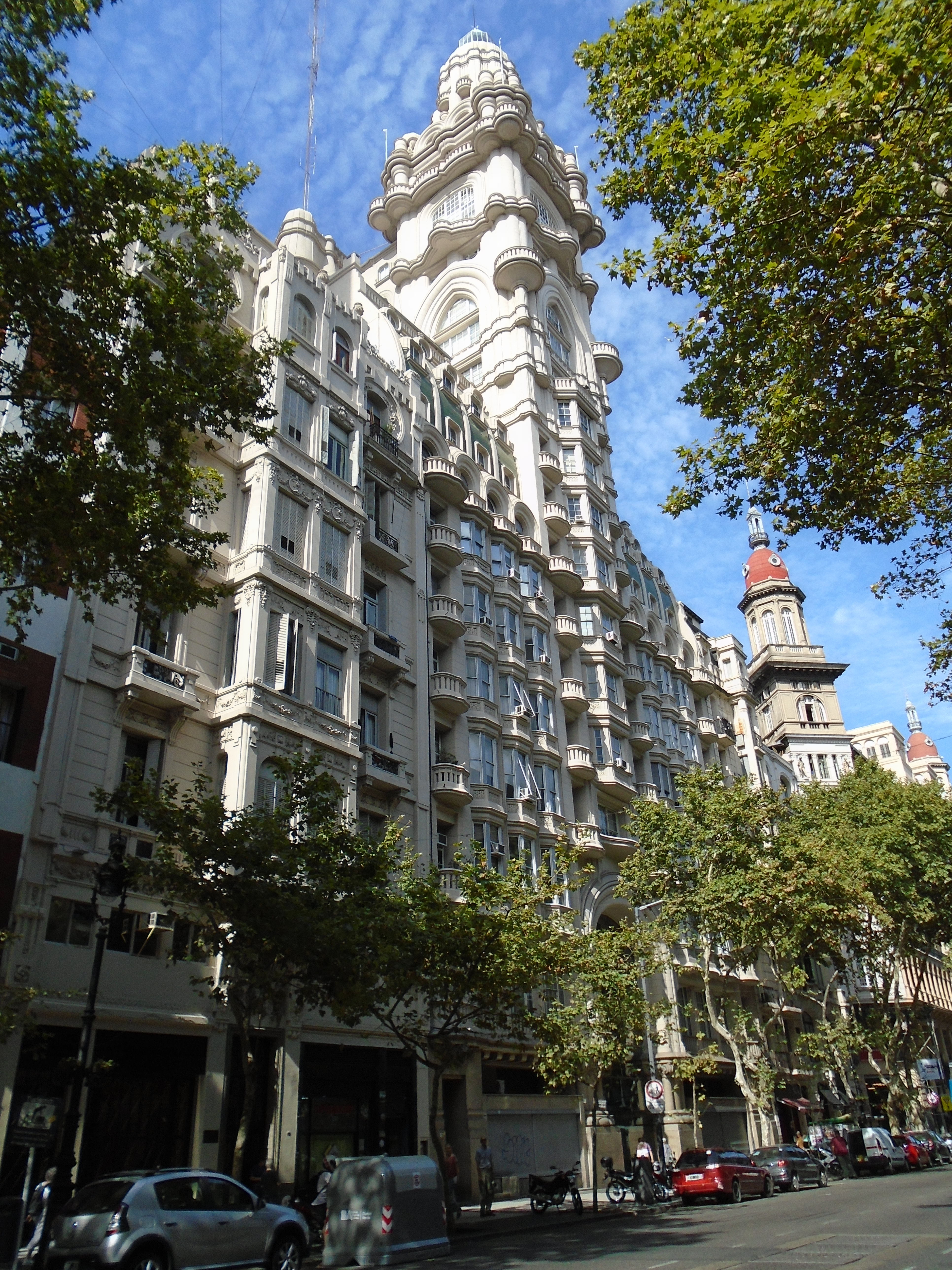 Palacio Barolo